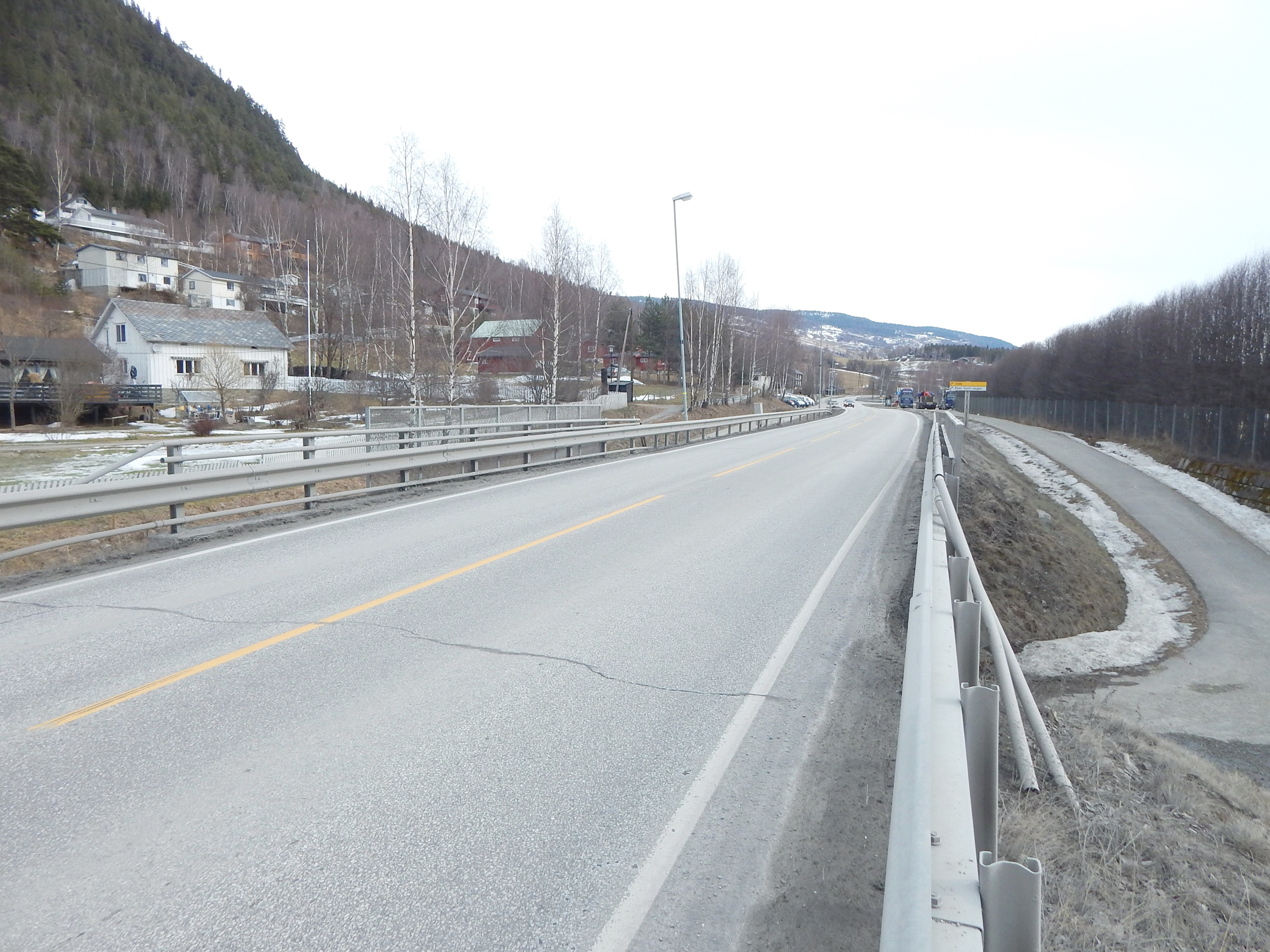 Fylkesvei 2522 (tidl. FV312 og før det E6) ved Harpefoss østover mot Lillehammer